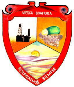 Escudo de la ciudad. El archivo del escudo de la villa de Viesca, es publico